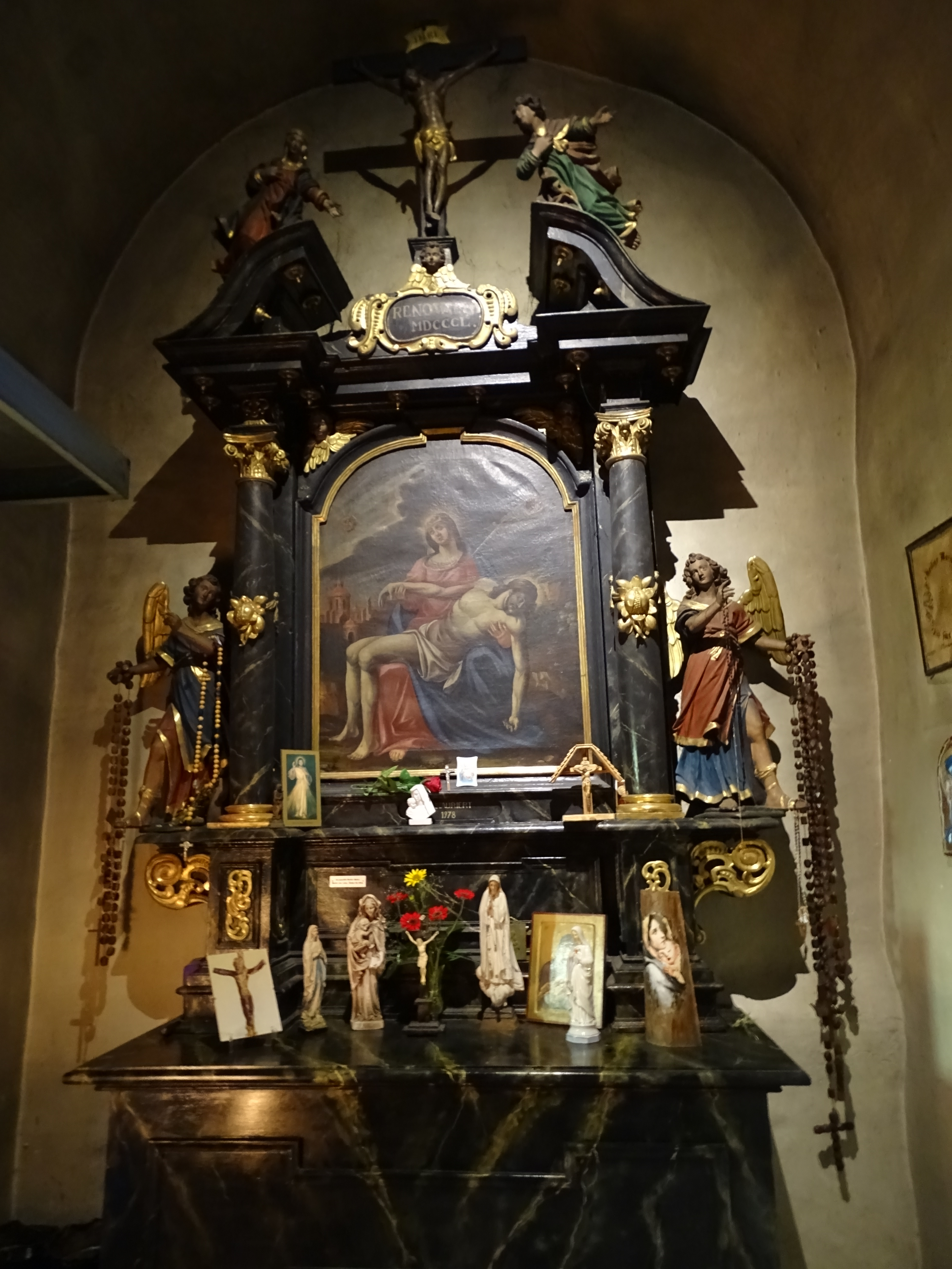 Der Altar der Mater dolorosa in der Marienkapelle in der Wallfahrtskirche Maria Straßengel